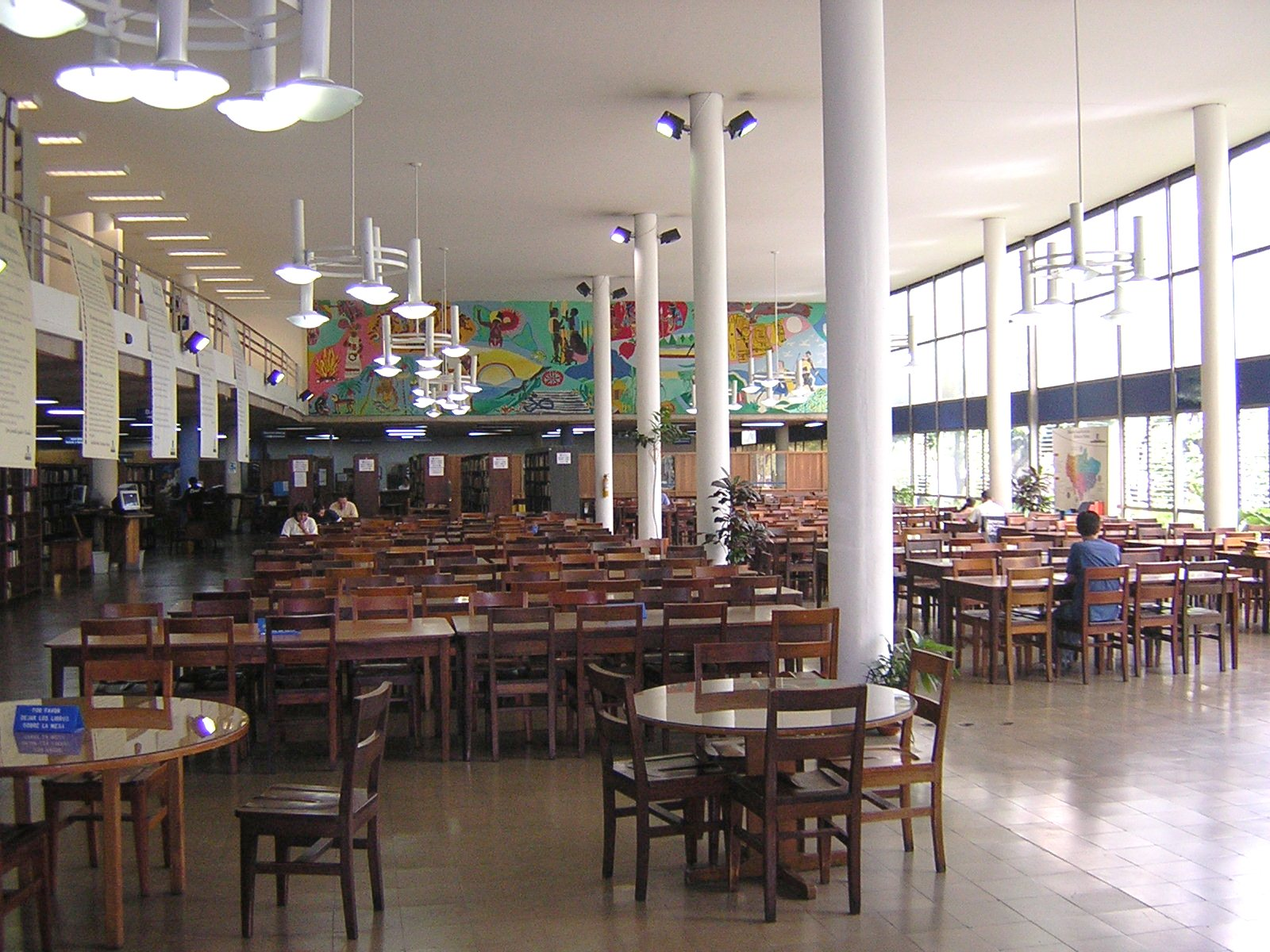 Biblioteca Publica Piloto de Medellín, Colombia